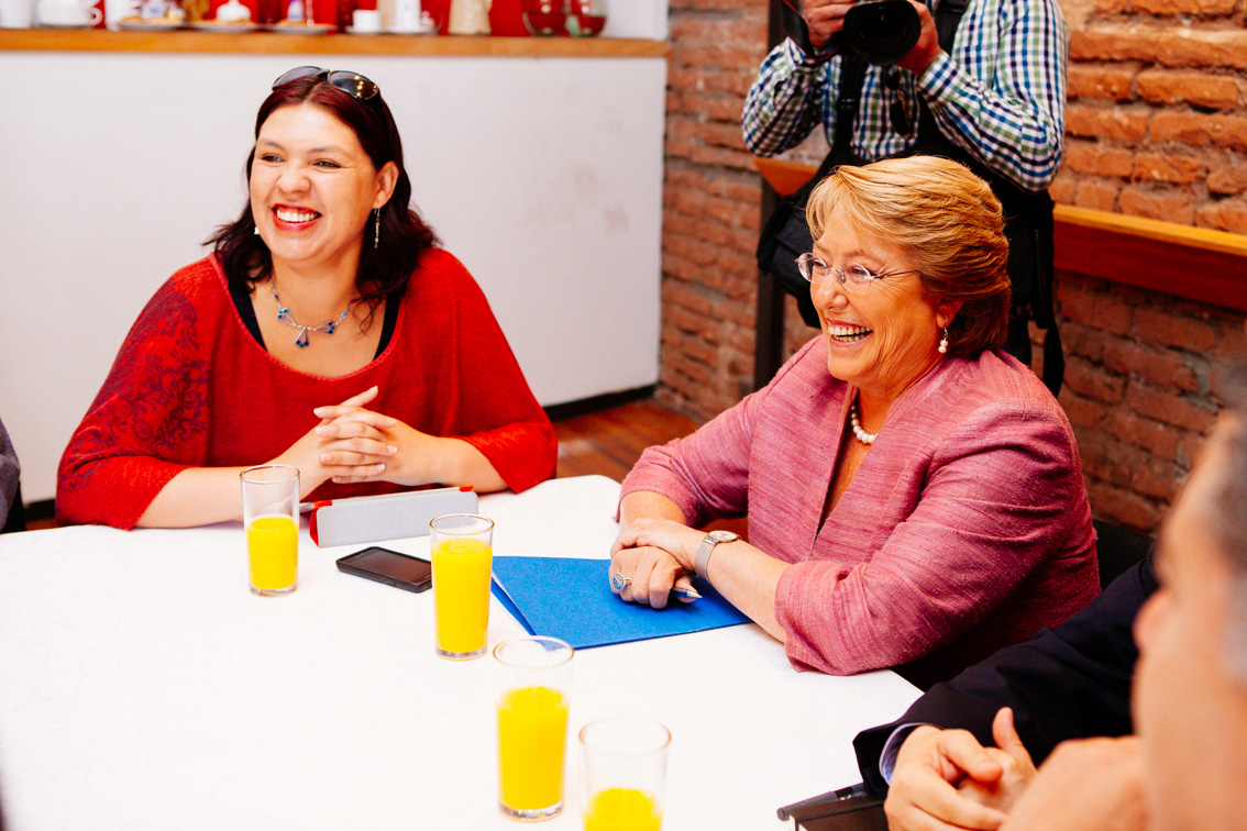 Michelle se reunió con la directiva de la CUT 02/12/2013 Michelle Bachelet se reunió con la directiva de la CUT.